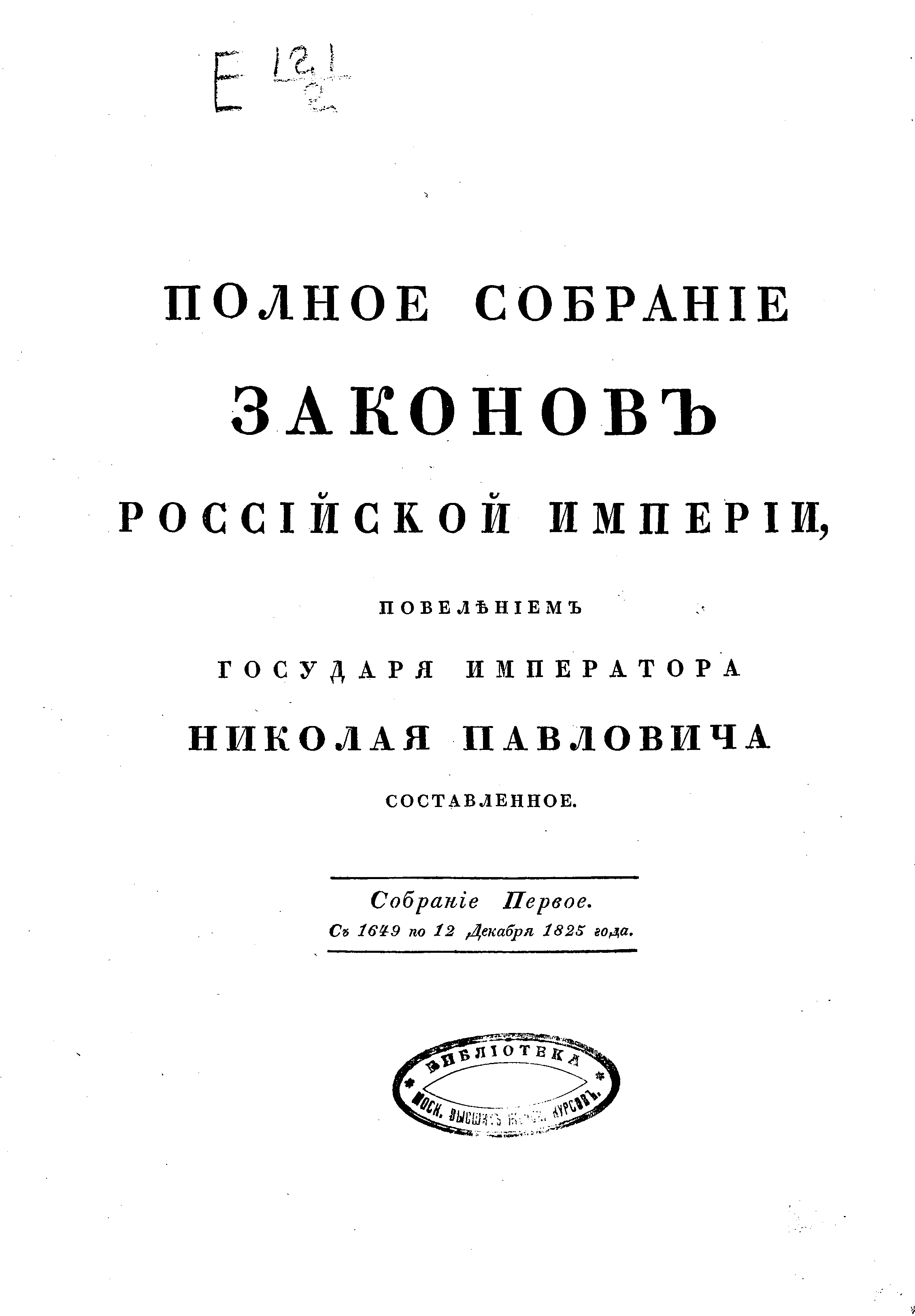 Полное собрание законов Российской Империи. Собрание Первое. Том I. 1649 - 1675 гг.